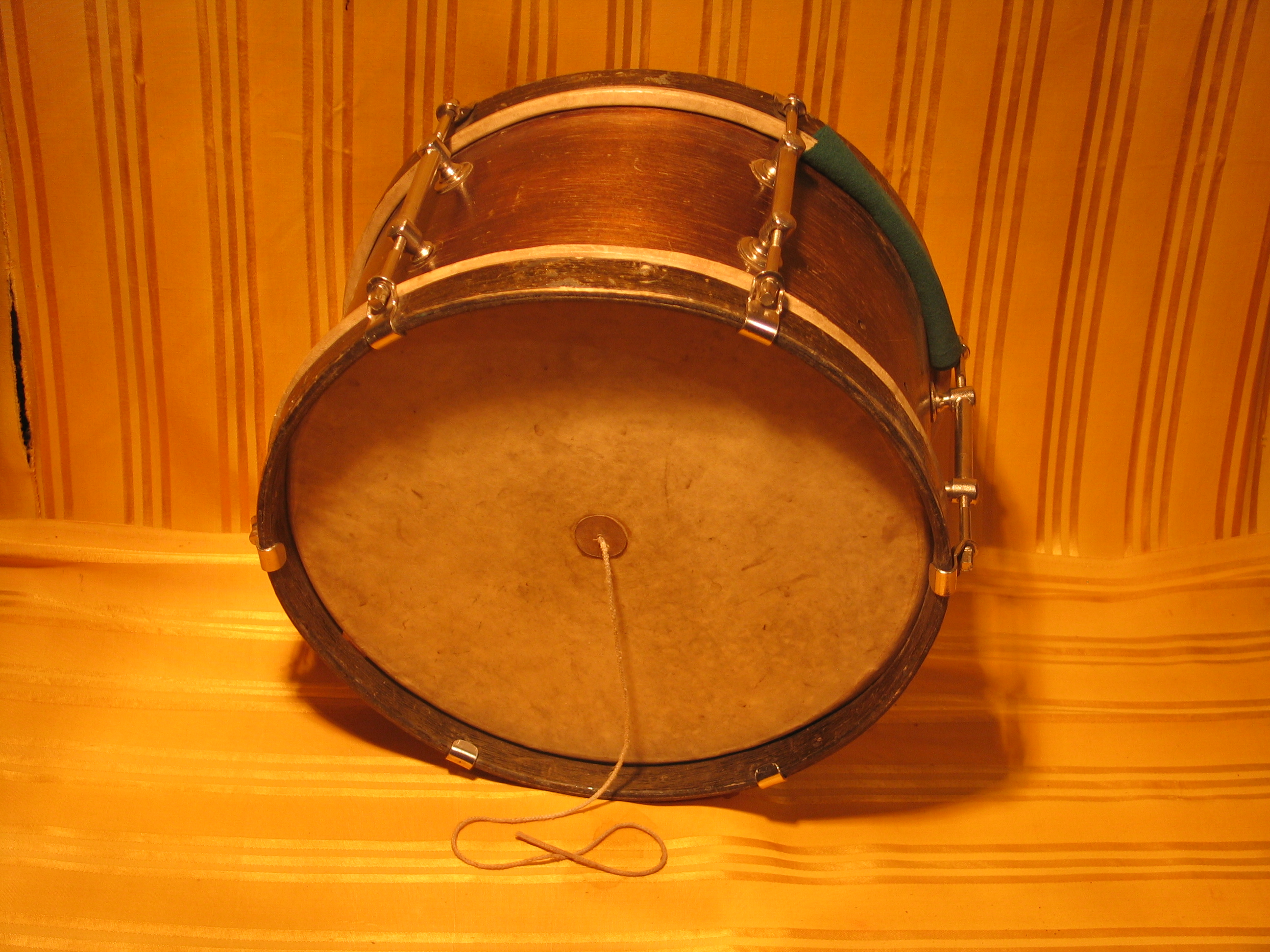 Фолк-шоу группа Колядки (Ансамбль народной музыки Колядки)